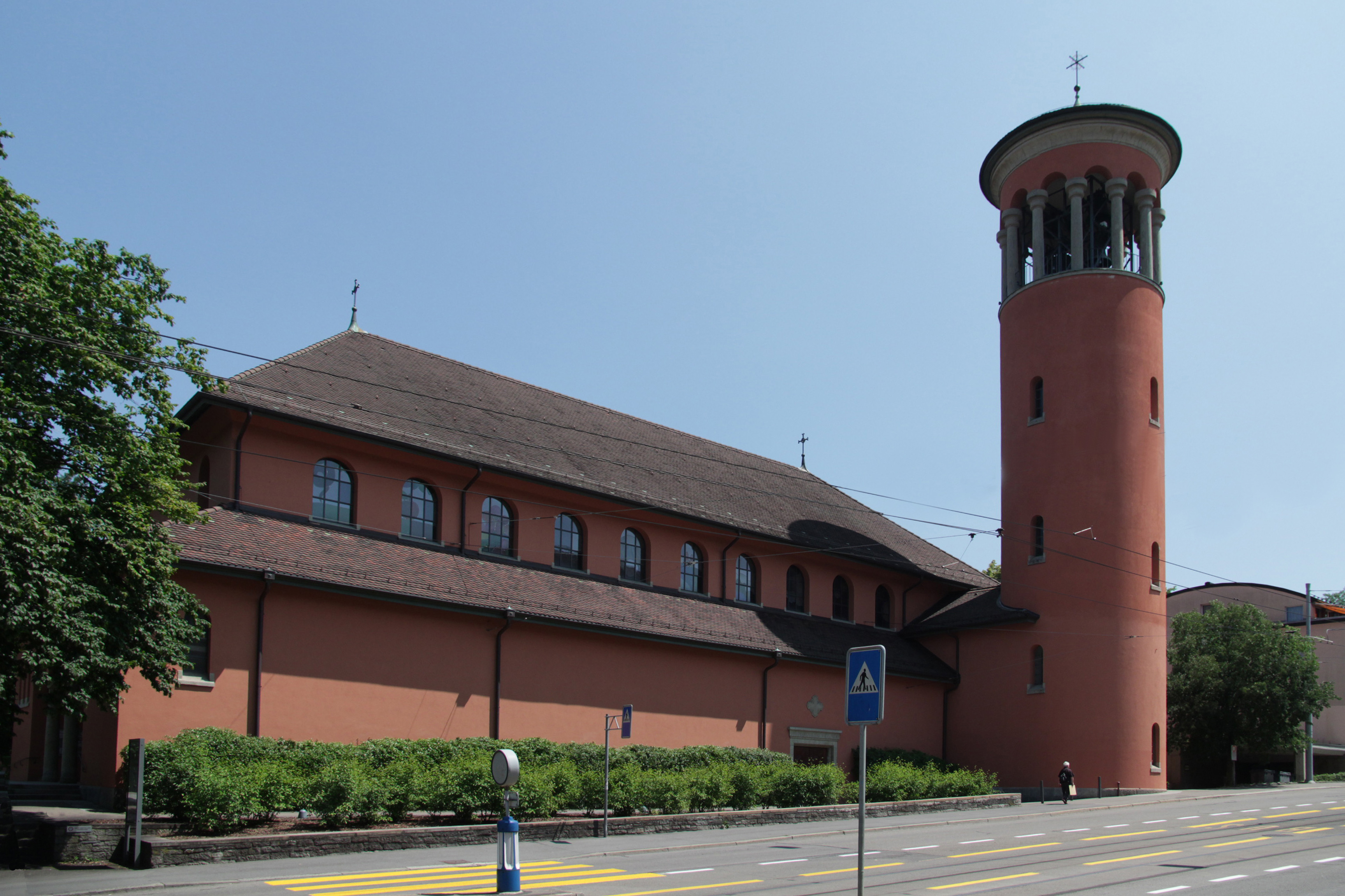 Römisch-katholische Kirche St. Franziskus, Zürich-Wollishofen